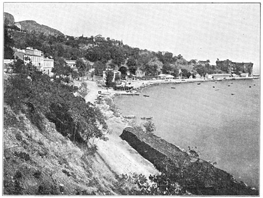 "Bougie.—Gezicht aan zee en op het fort Abd-el-Kader" (Bougie is een andere naam voor Béjaïa)